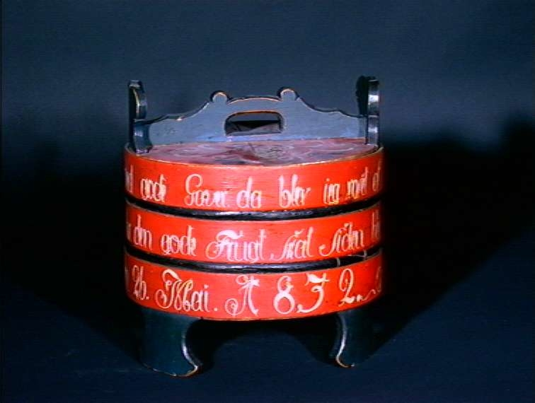 Grøtambar eller "dylle" datert 1832 fra Ål i Buskerud. Innskriften forteller at den har vært brukt til grøt: Naar jeg er fuld med gode Gaver da blev ieg roset af ver Mand. / Det Frø som bær den gode Frugt skal siden blive til Ærre brugt. / Schierven den 26. Mai 1832. A. O. D. Kd. Høyde 30 cm. Foto Anne Lise Reinsfelt / Norsk Folkemuseum, NF 1920-0010.